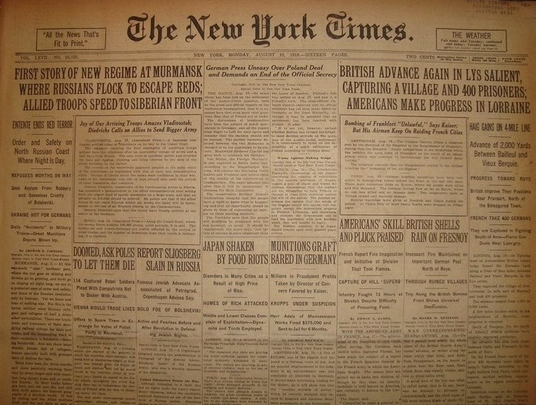 New York Times 1918-08-19